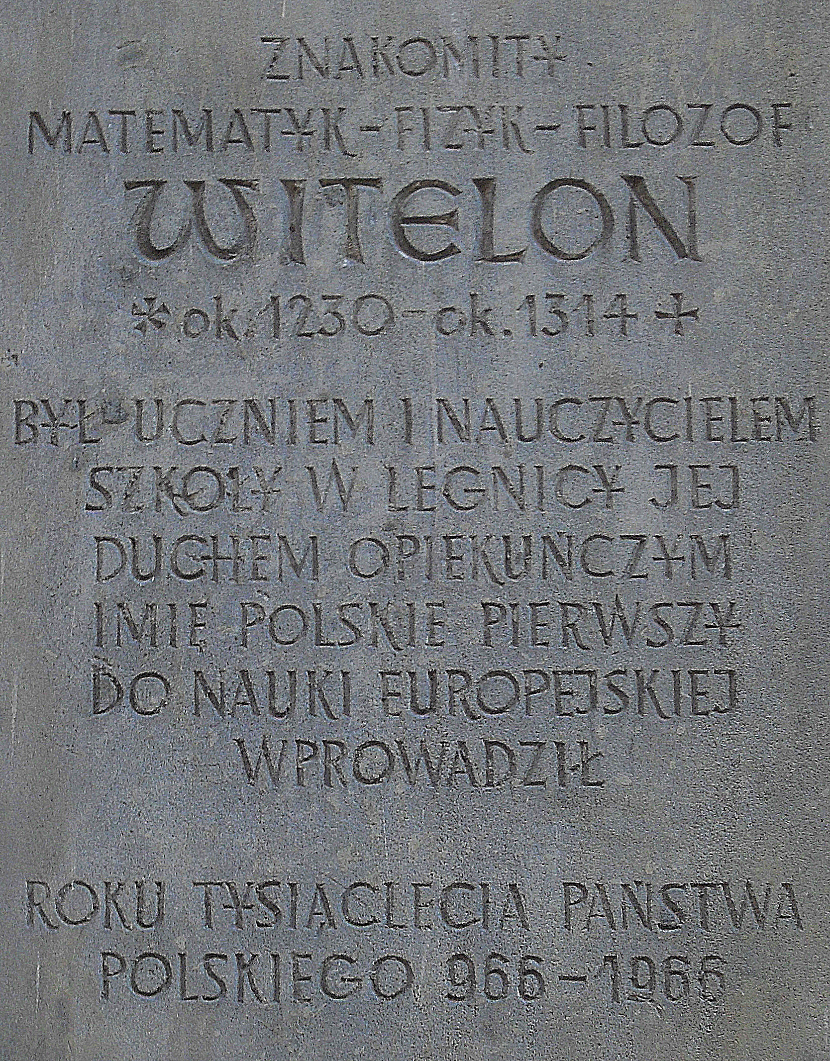 Legnica, na fasadzie Muzeum Miedzi.